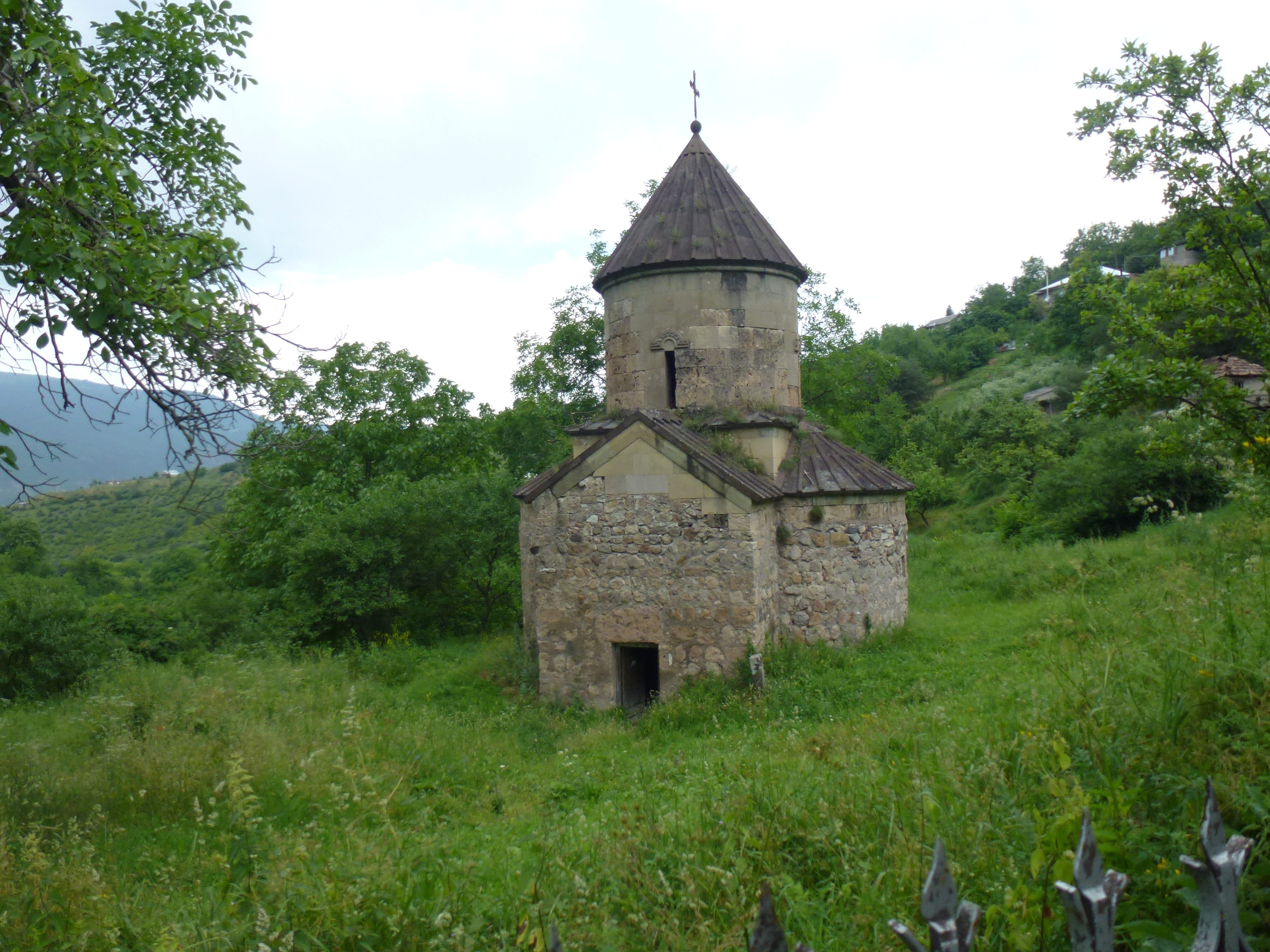 Ծռվիզի վանք, Հայաստան 33/1